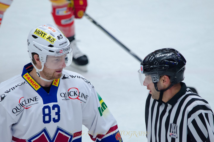 Düsseldorfer EG VS. EHC Biel